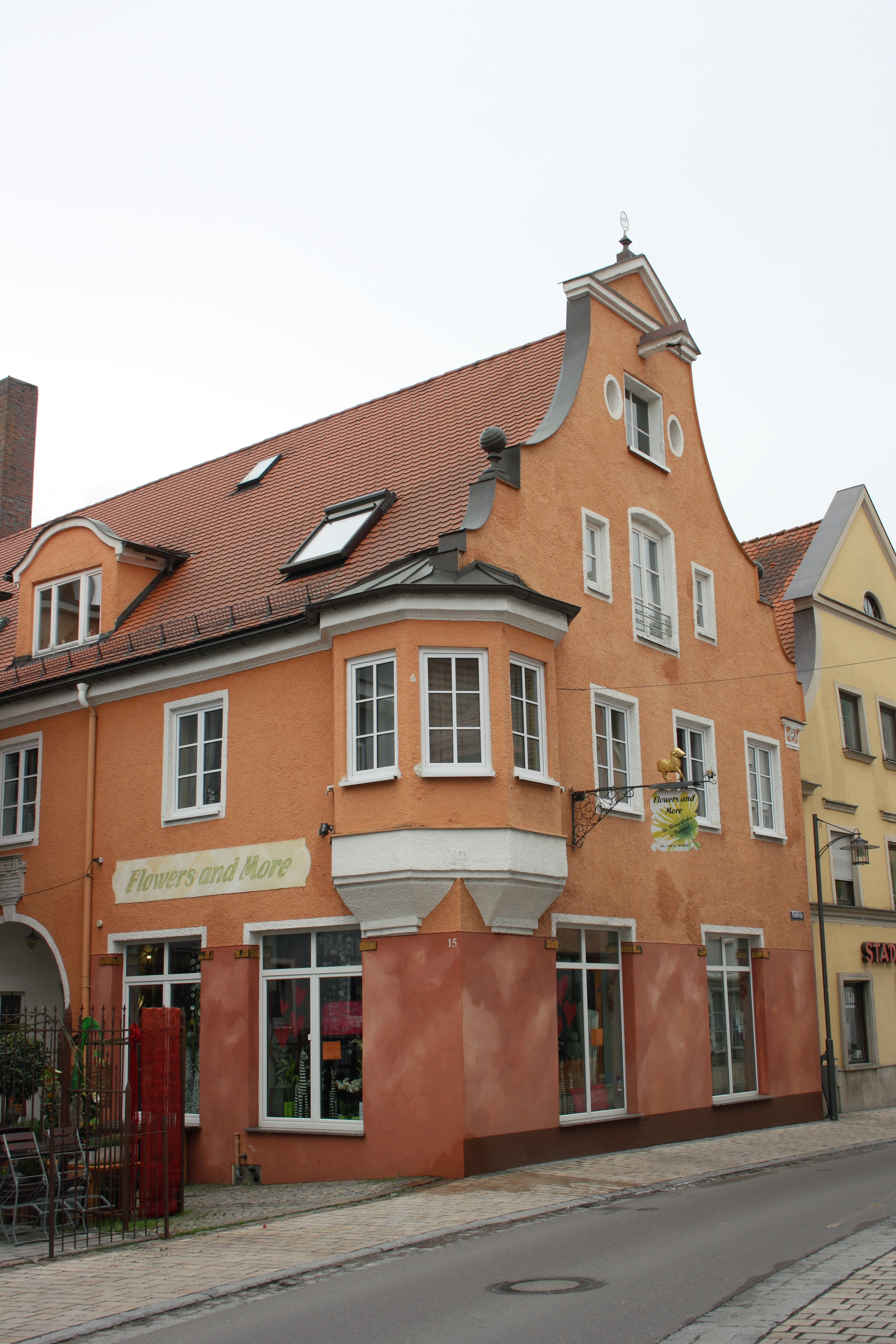 Haus in Burgau im Landkreis Günzburg (Bayern), Stadtstraße 15